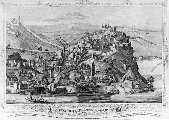 Starý Vyšehrad, 1420